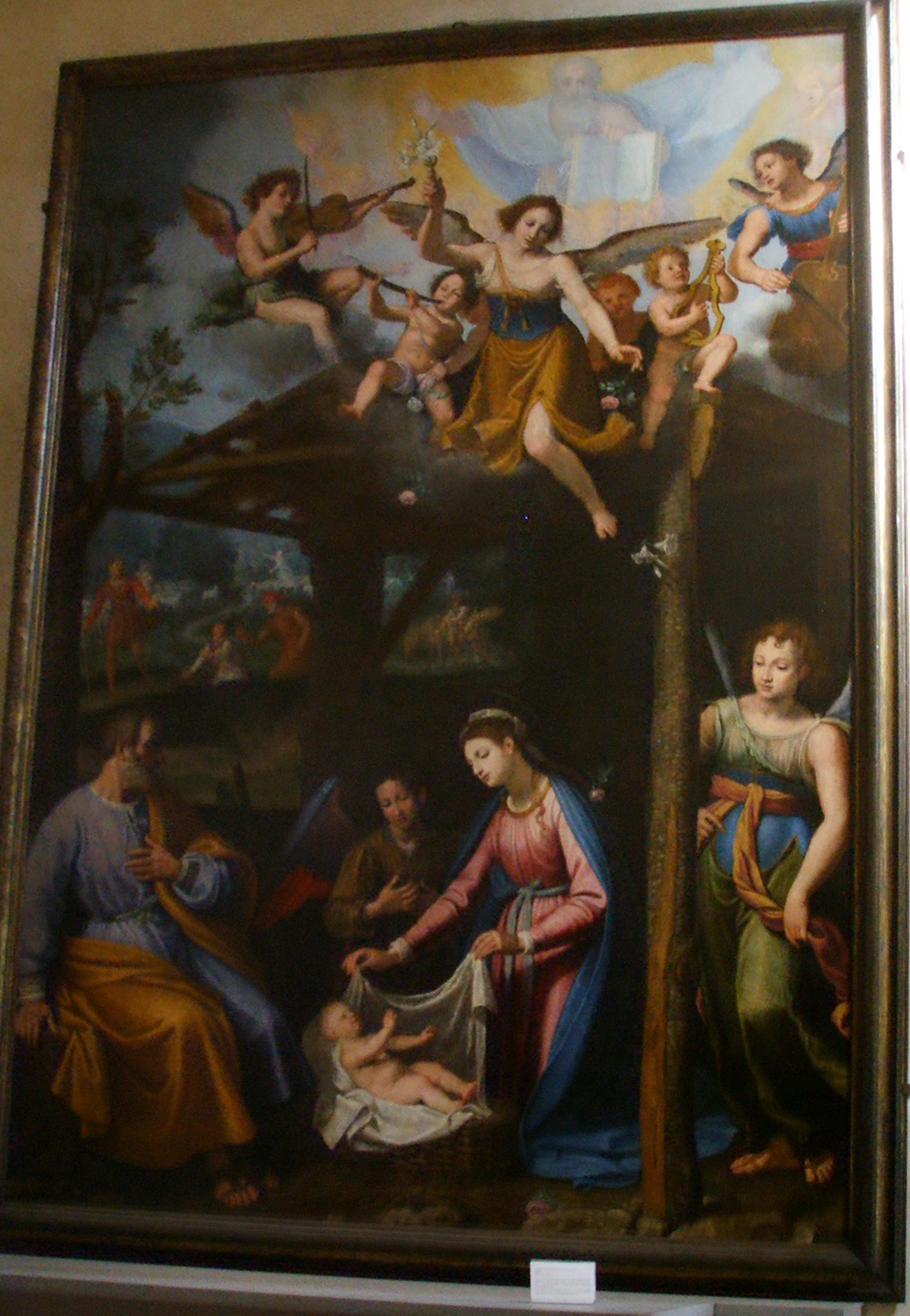 Santa_Maria_Maddalena_de'_Pazzi cosimo_gamberucci_natività_0 in Florence